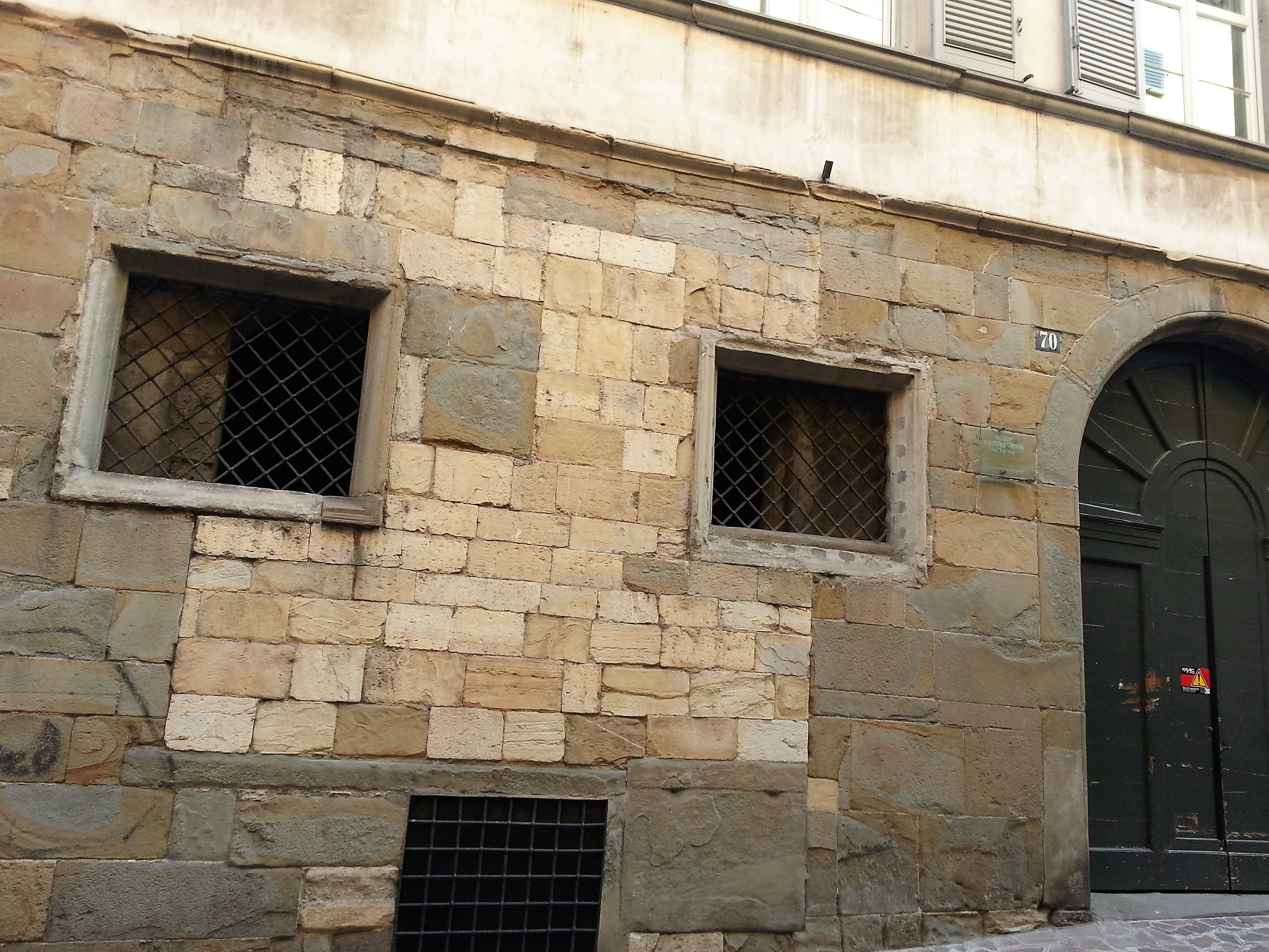 Bugnoto presente sulla facciata di palazzo Bonomi in via Pignolo